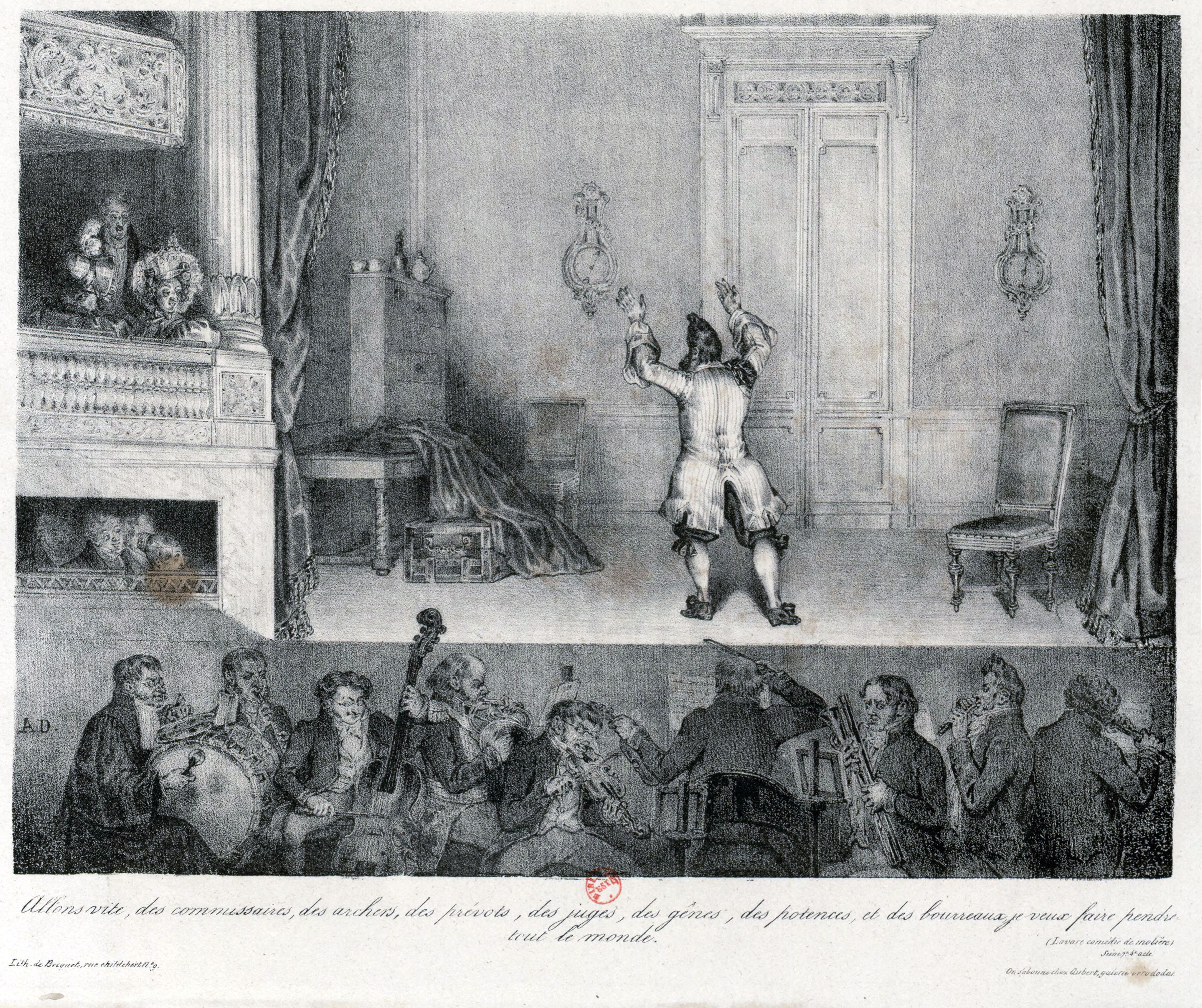 Estampe. Allons vite, des commissaires, des archers, des prévots, des juges, des gênes, des potences, et des bourreaux, je veux faire pendre tout le monde (Lavare [sic] comédie de molière. Scène 7.e - 4.e acte. 20,3 x 27,5 cm.